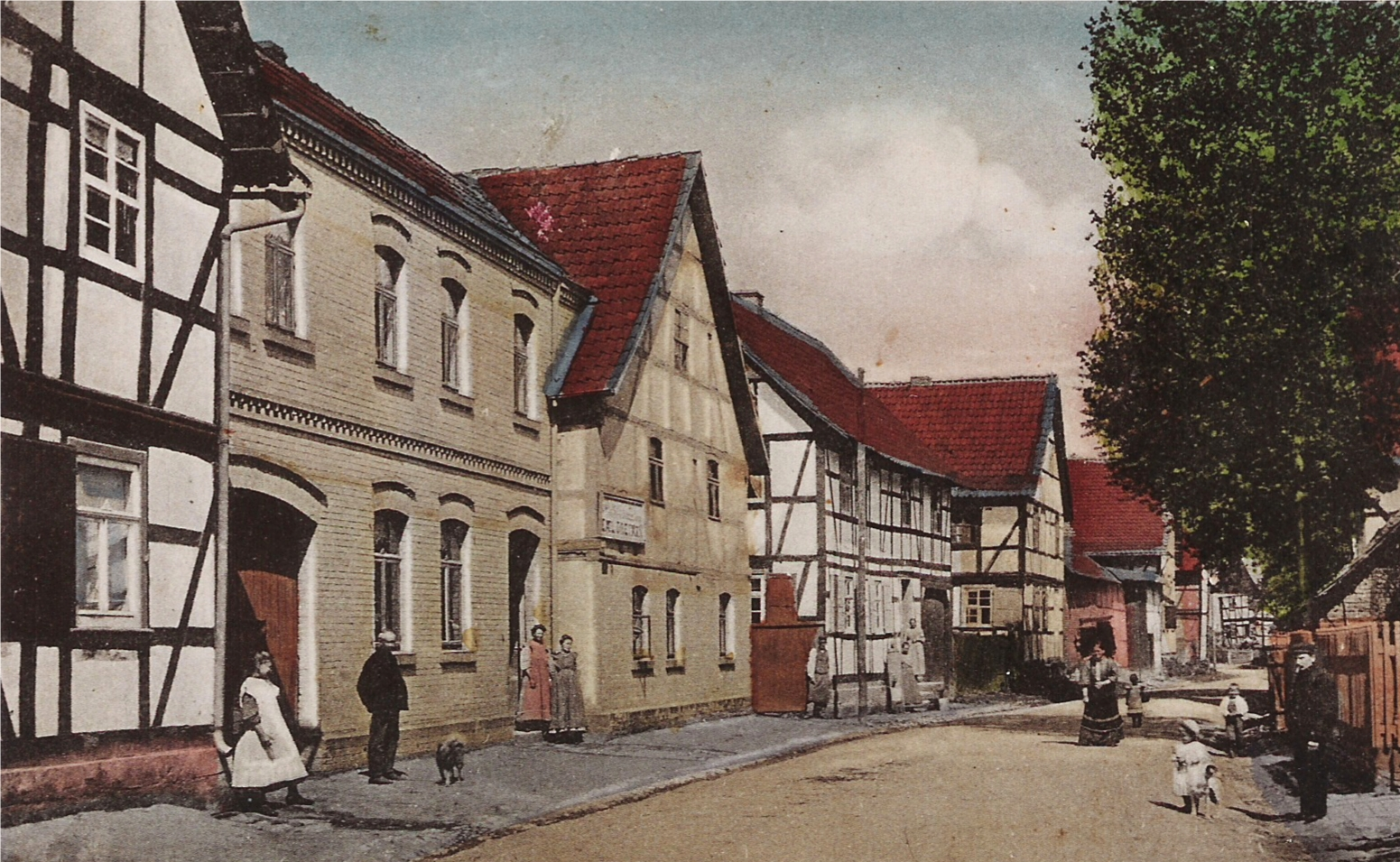 Dorfstraße